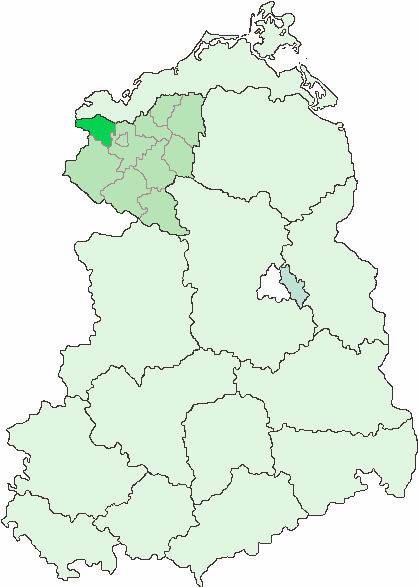 Skizze freihand erstellt Rauenstein 05:50, 1. Sep 2006 (CEST) HINWEIS: vorerst nicht für commons bestimmt.